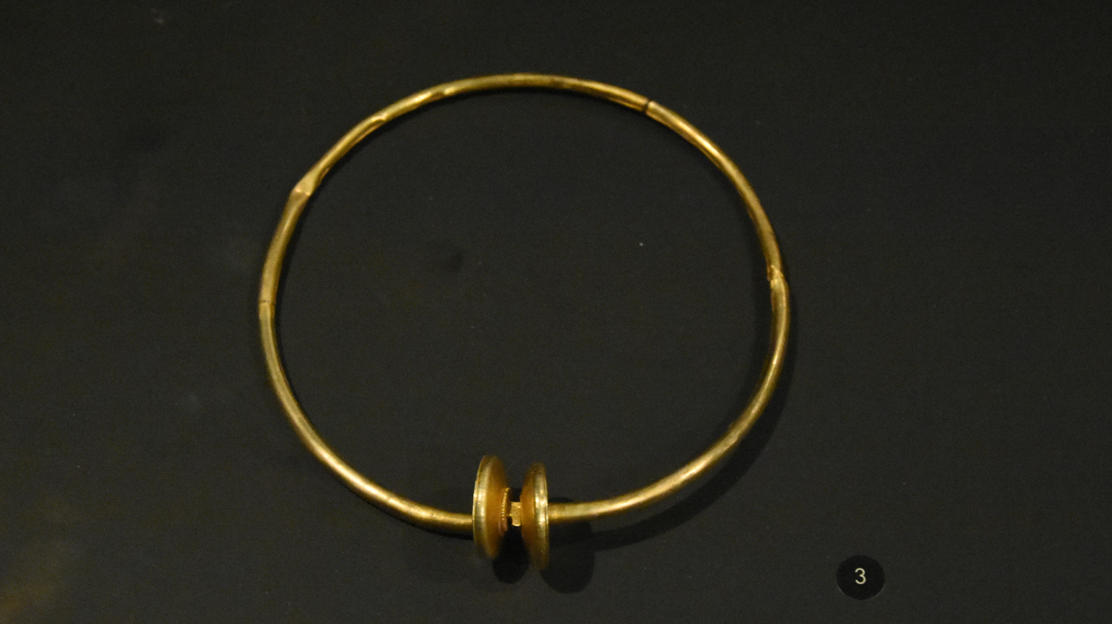 Fragment van een gouden armband Beringen (150-100v.Chr.) Gallo-Romeins Museum (Tongeren) 24-03-2018